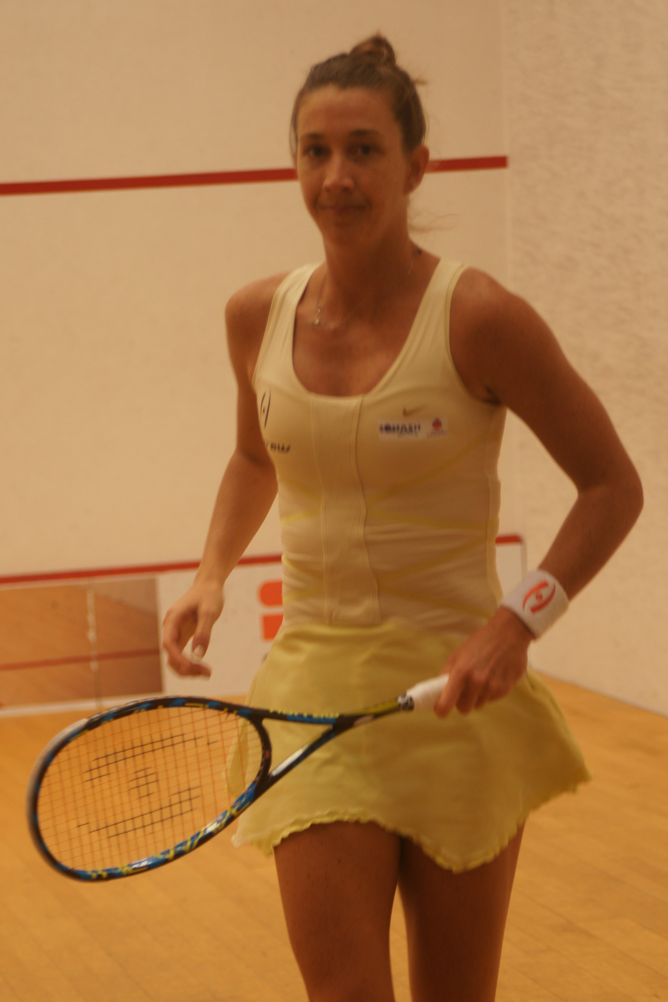 Donna Urquhart, Monaco Squash classic 2016